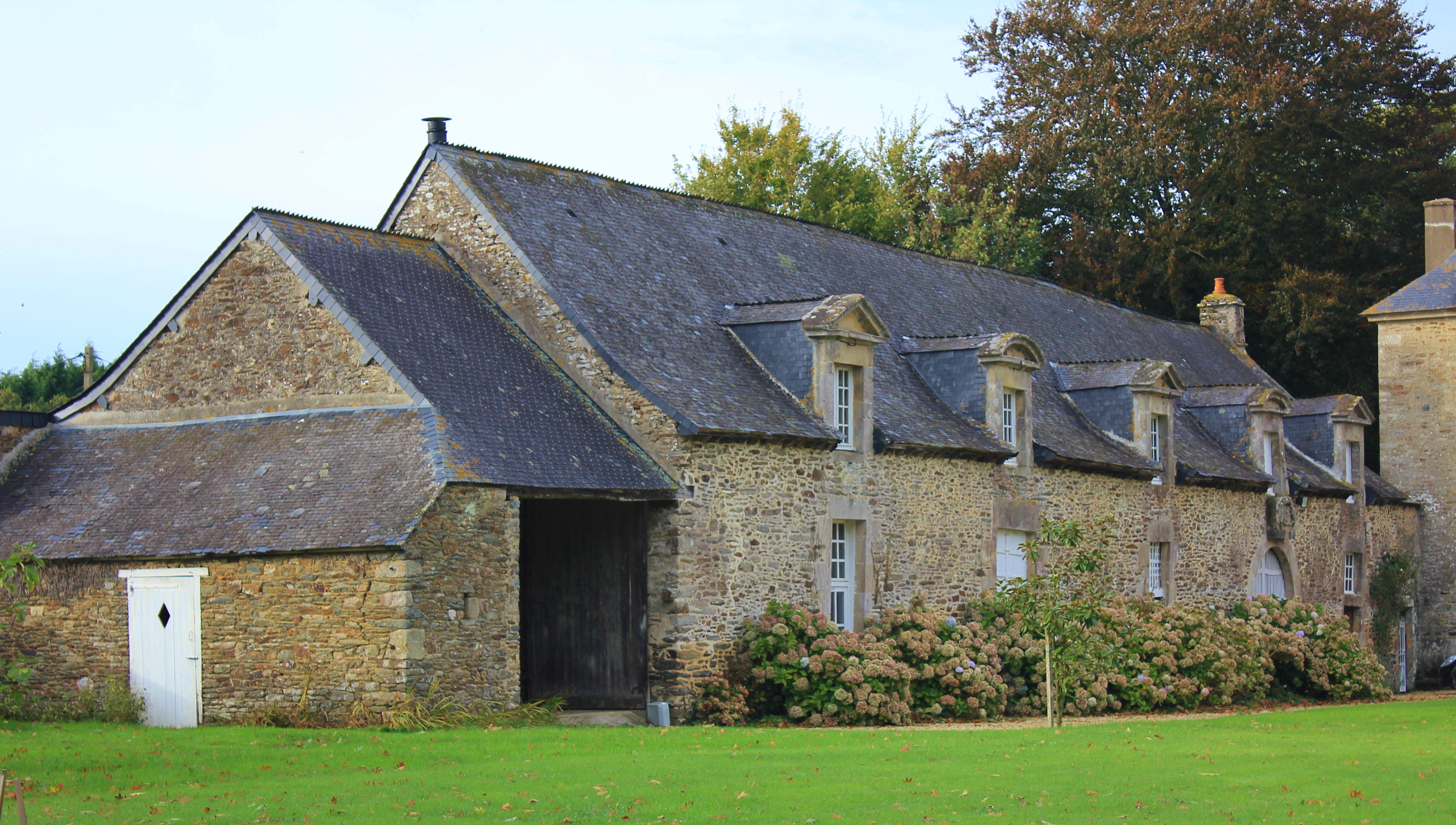 Château de Porhman : bâtiment secondaire au sud-ouest du batiment du principal, tournée vers l'aller centrale